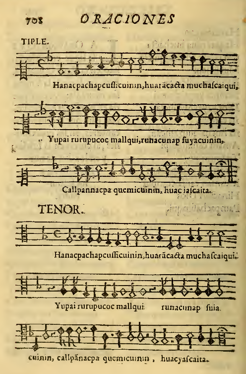 Hanacpachap cussicuinin, chant de procession anonyme faisant partie du rituel catholique péruvien du XVIIe siècle. Il constitue la première polyphonie publiée en langue quechua.